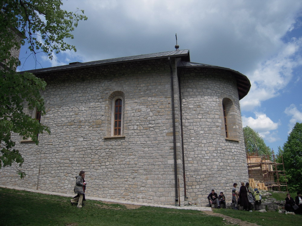 Manastir Krupa